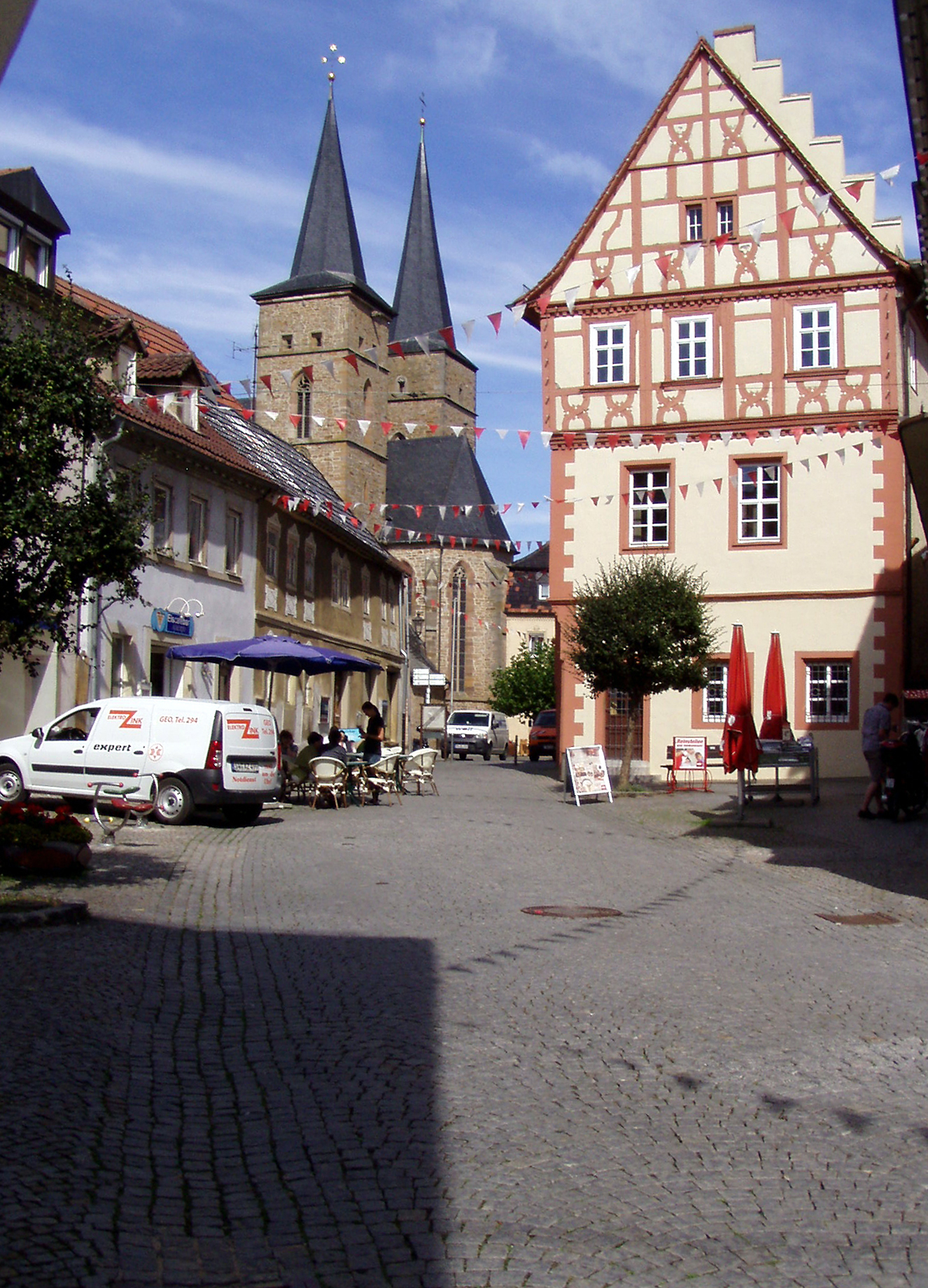 Optimierte Version von GerolzhofenStadtpfarrkirche.JPG